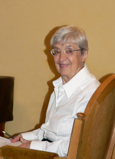 Научная конференция, приуроченная к юбилею Инны Алексеевны Барсовой. Конференц-зал Московской консерватории, сентябрь 2007.